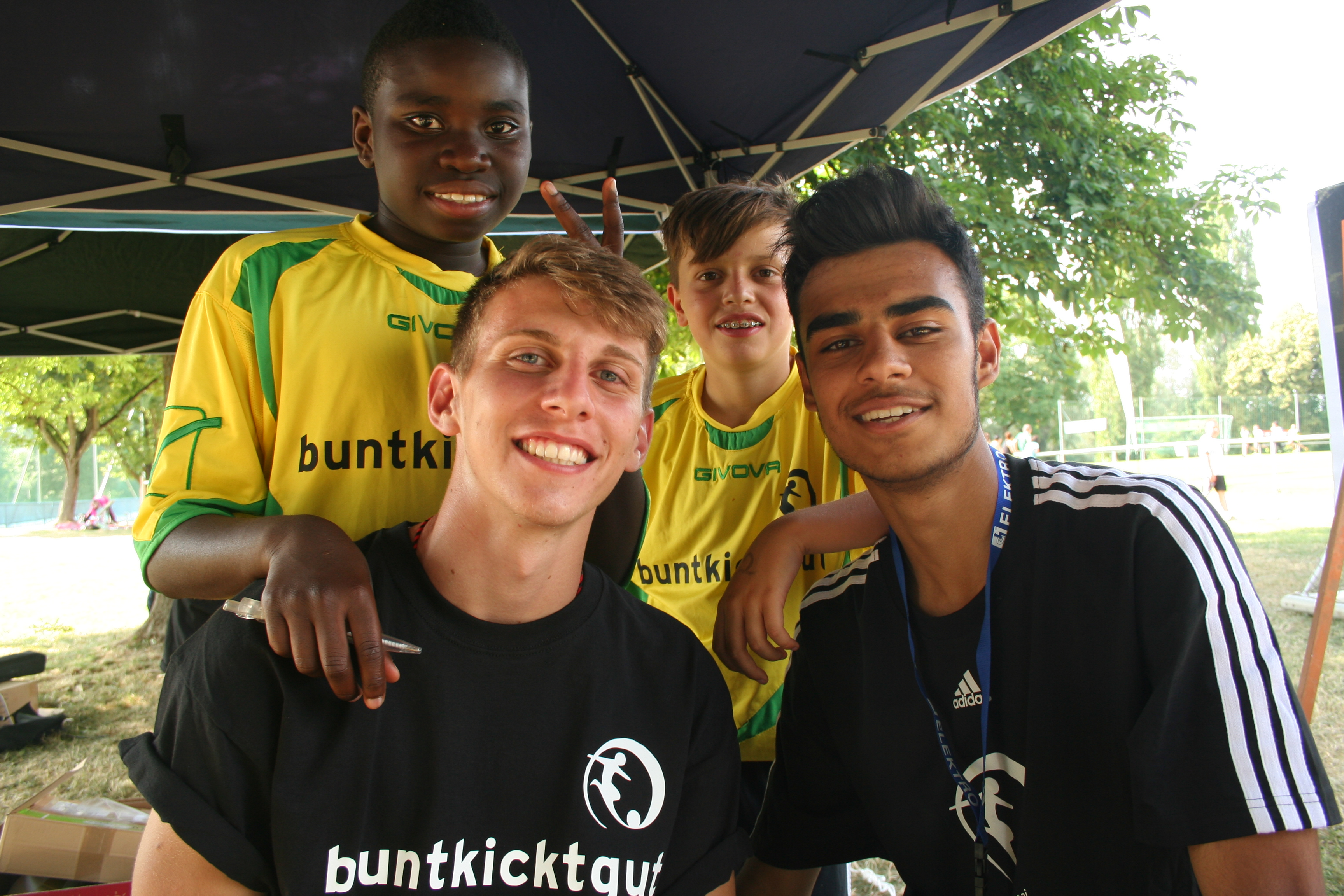 Geschulte Street Football Worker übernehmen Verantwortung gegenüber Jüngeren und bieten Trainingsangebote an